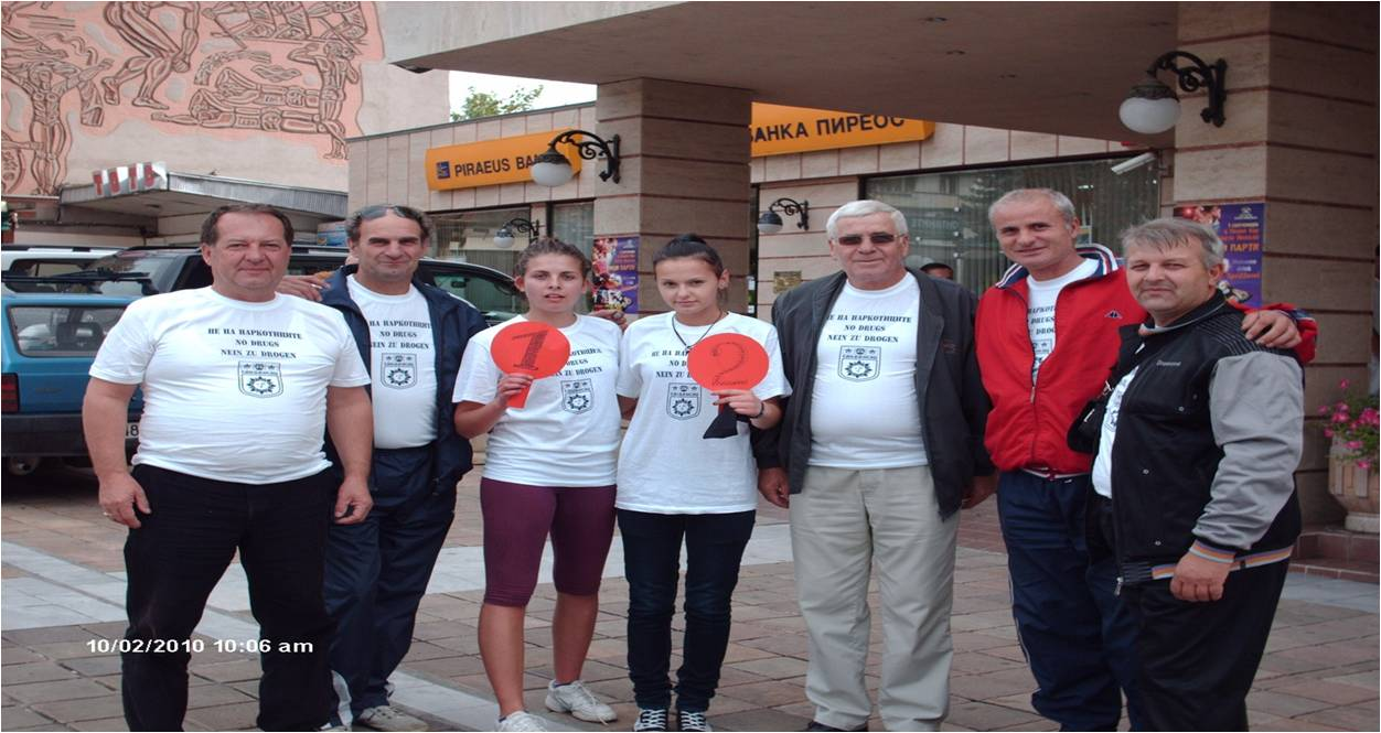 Natprevar